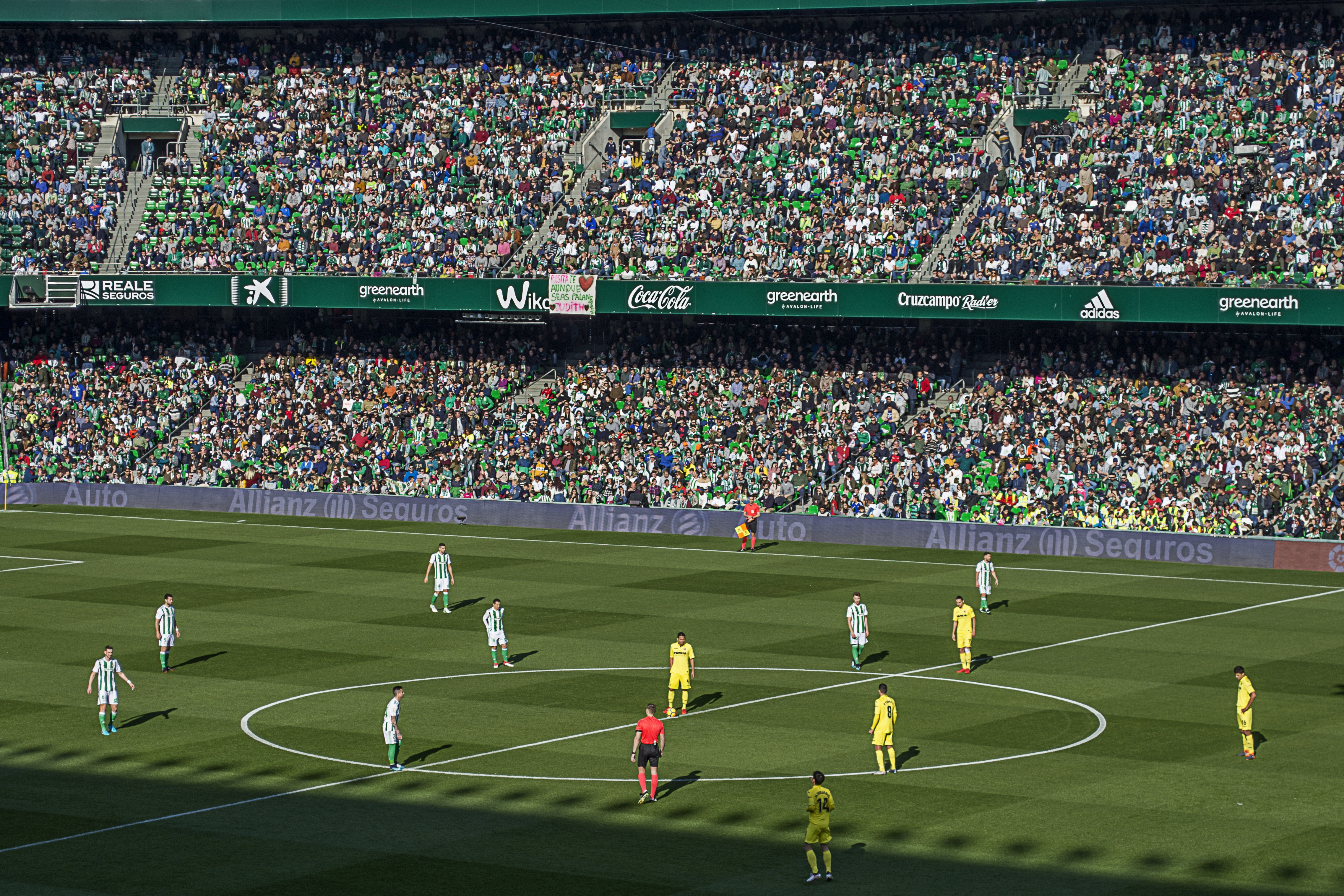 Inicio del partido Real Betis-Villarreal Club de Fútbol correspondiente a la jornada 22 de la temporada 2017/18 de la liga. Estadio Benito Villamarín. Debut de Loren Morón en el Real Betis.